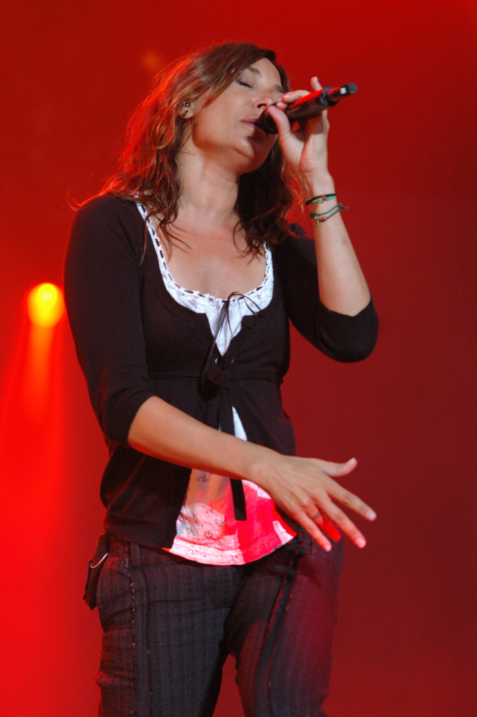 Zazie sur scène dans le cadre du festival Musilac 2007 à Aix-les-Bains (photo personnelle)